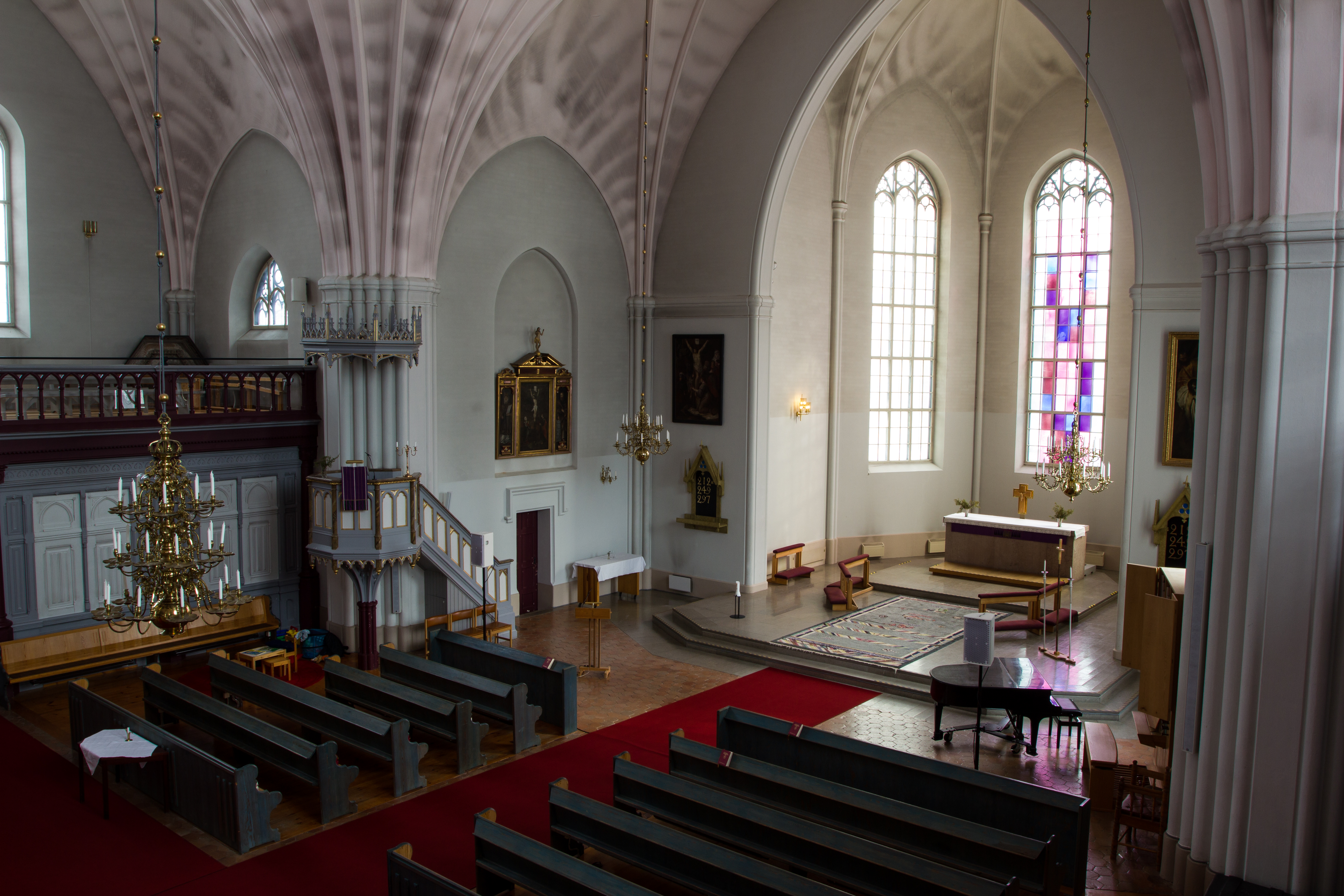 Skinnskattebergs kyrka, Skinnskatteberg, Sverige. Interiörvy från södra läktaren.